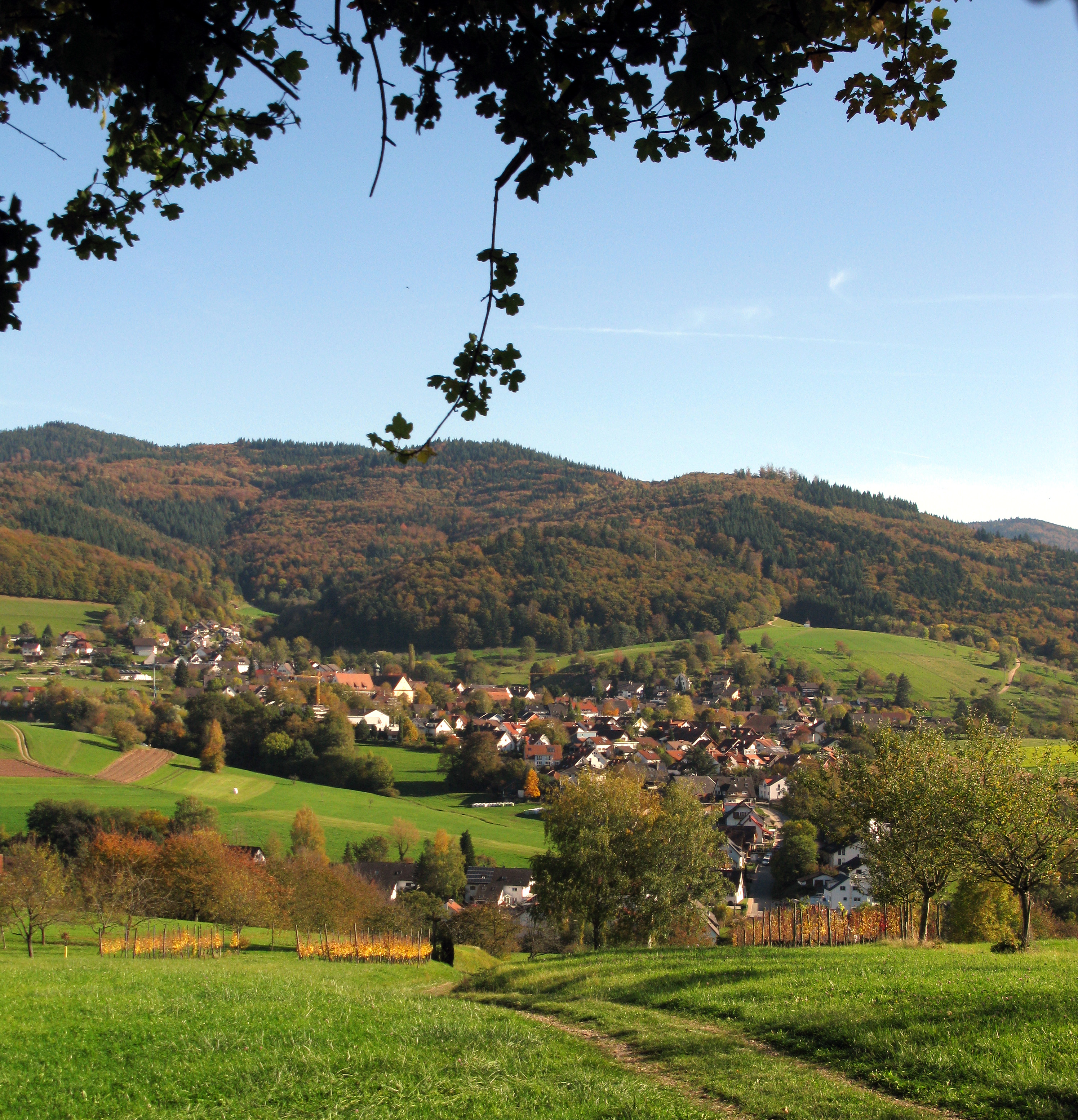 Sölden im Hexental